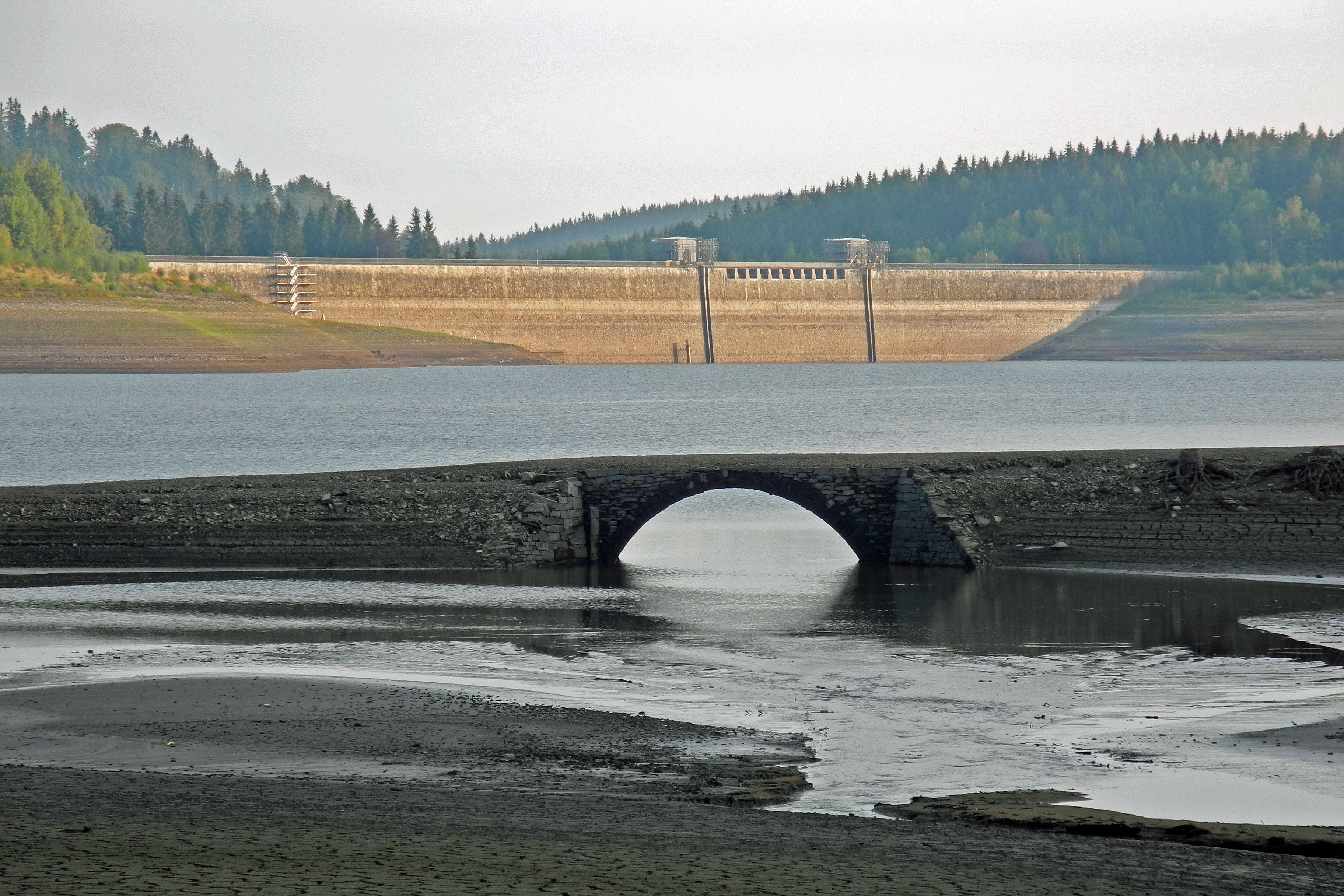 Blick auf die alte Steinbrücke („Zinnbrücke“) an der ehem. Siedlung Steinbrückmühle in der teil-entleerten Talsperre Lehnmühle im Tal der Wilden Weißeritz im Erzgebirge. Über diese Brücke führte bis 1932 die alte Zinnstraße von den Zinnerzgruben in Altenberg und Niederpöbel zu den Verhüttungsanlagen in Freiberg.